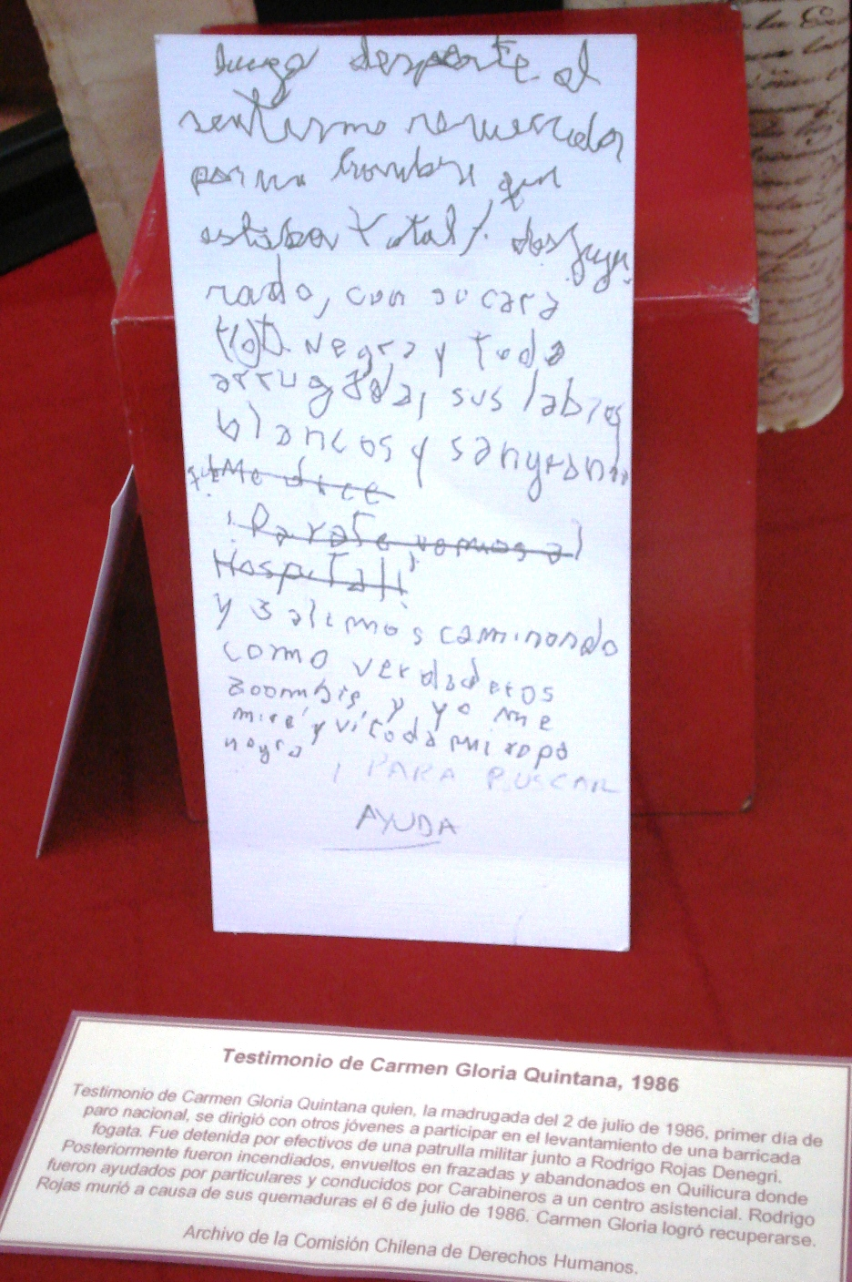 Testimonio de Carmen Gloria Quintana, ciudadana chilena quemada viva por efectivos de la dictadura militar de Augusto Pinochet. Archivo Nacional de Chile.